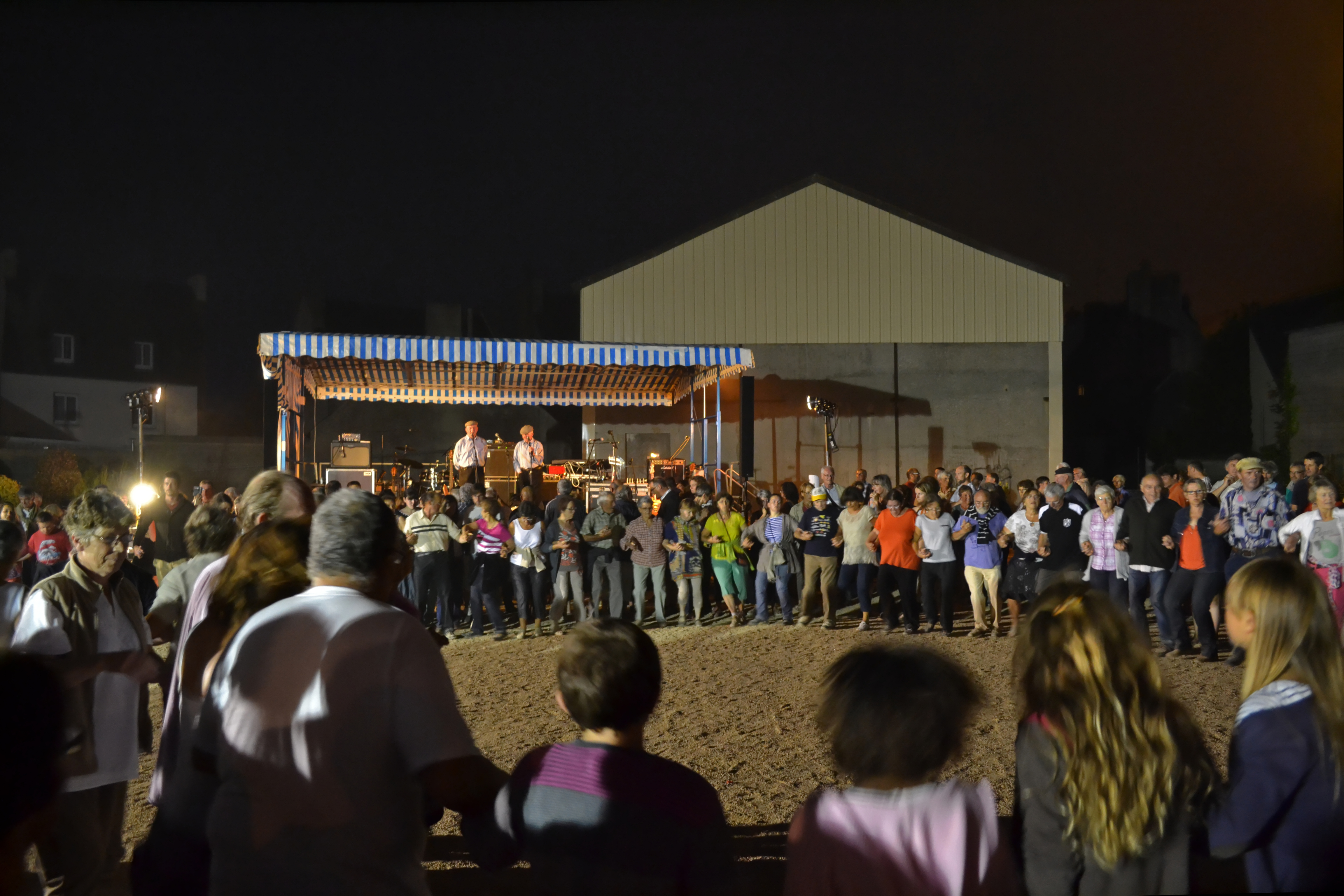 Fest-noz des Frères Morvan organisé pour conclure la course à pied des 100 km de Cléder (Finistère) le 21 juillet 2013.